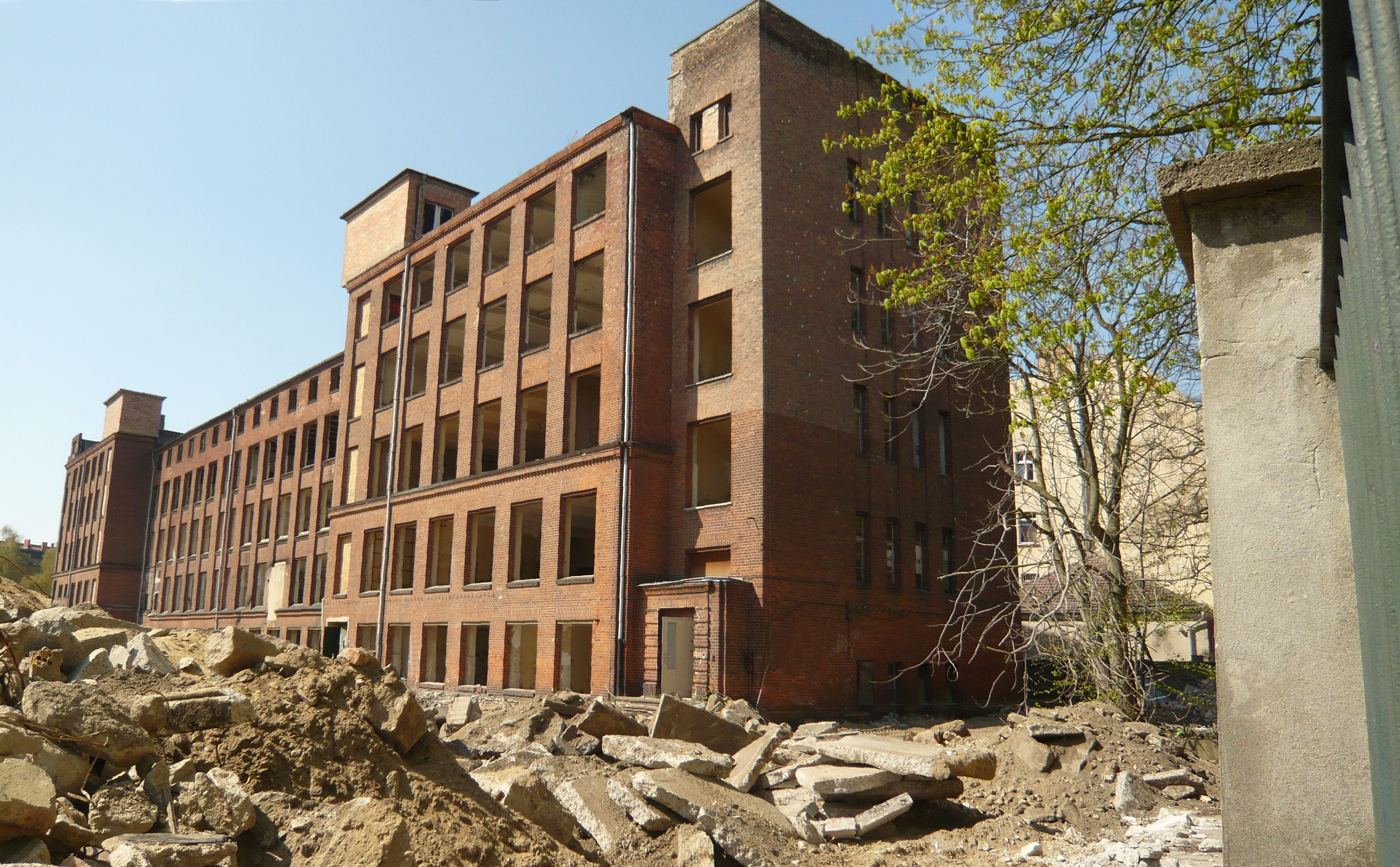 Berlin-Alt-Hohenschönhausen; Konrad-Wolf-Straße